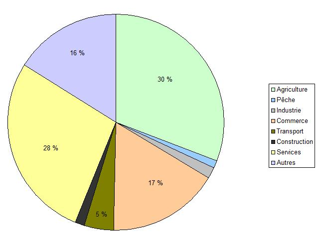 Emploi dans le district de Chittagong, division de Chittagong, Bangladesh.